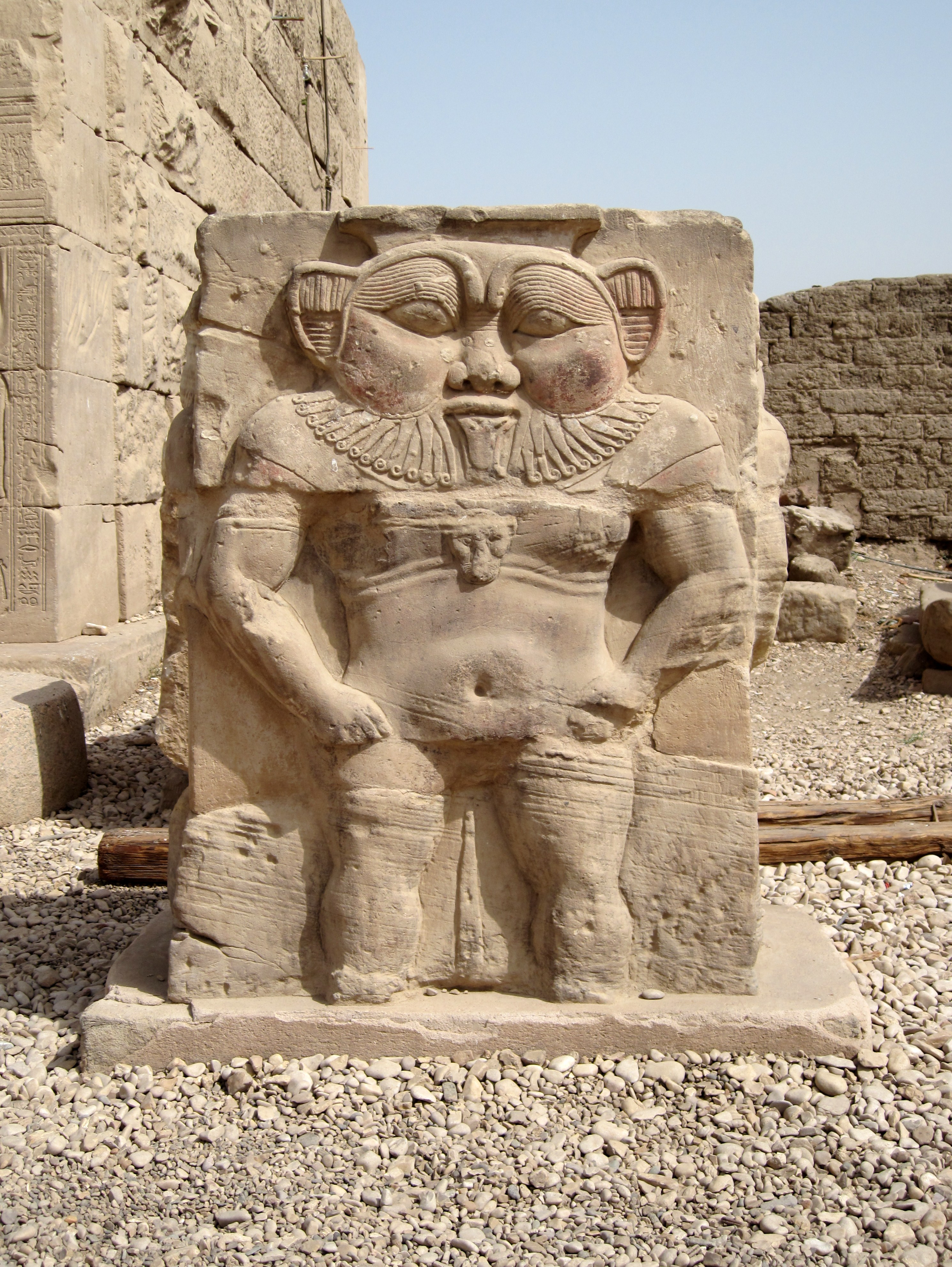 Relief des Gottes Bes neben dem römischen Nordtor des Tempelkomplexes von Dendera, Ägypten